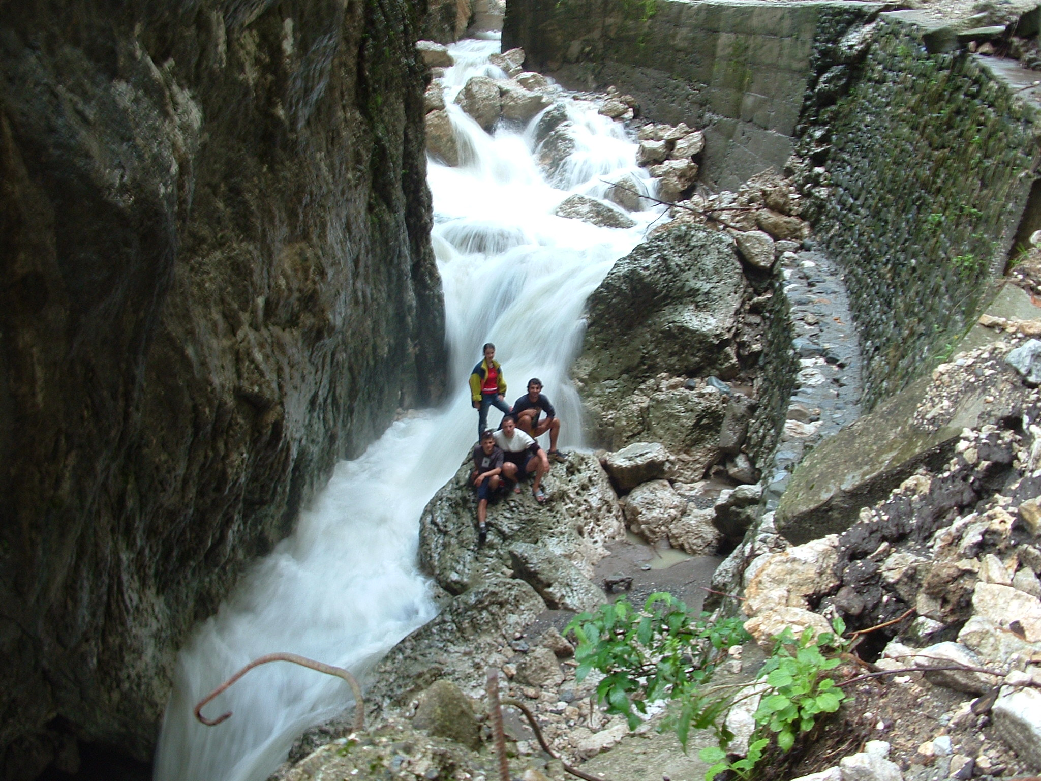 Made it myself Made it myself